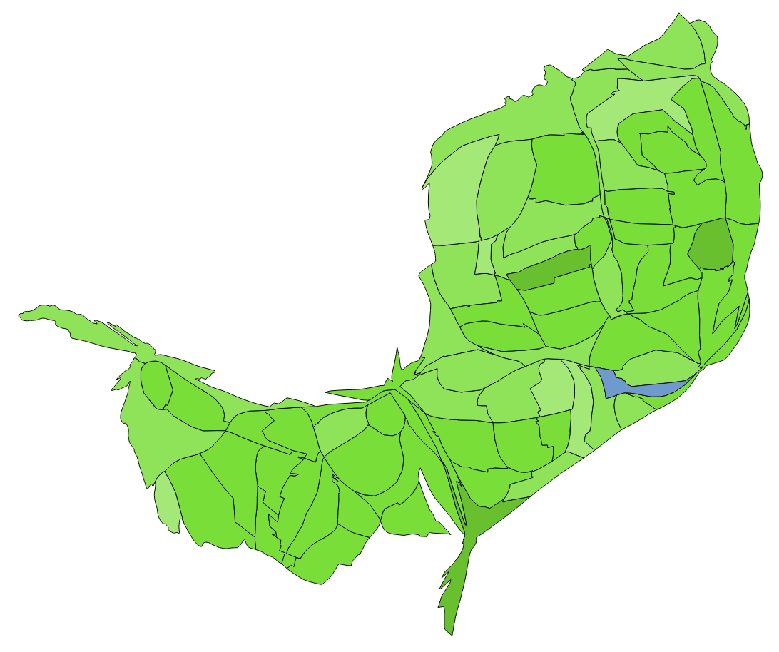 顏色對照表